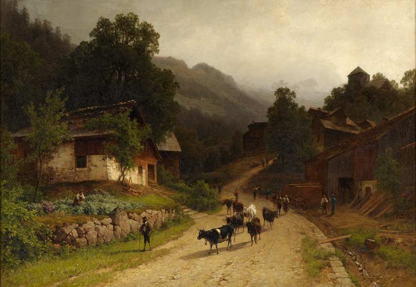 Ansicht von Bürgeln, Schweiz. ((gemeint ist evtl Kaiserstuhl-Bürglen bei Lungern) Signiert. Datiert (18)76. Rückseite betitelt. Öl auf Leinwand, 66 x 95 cm